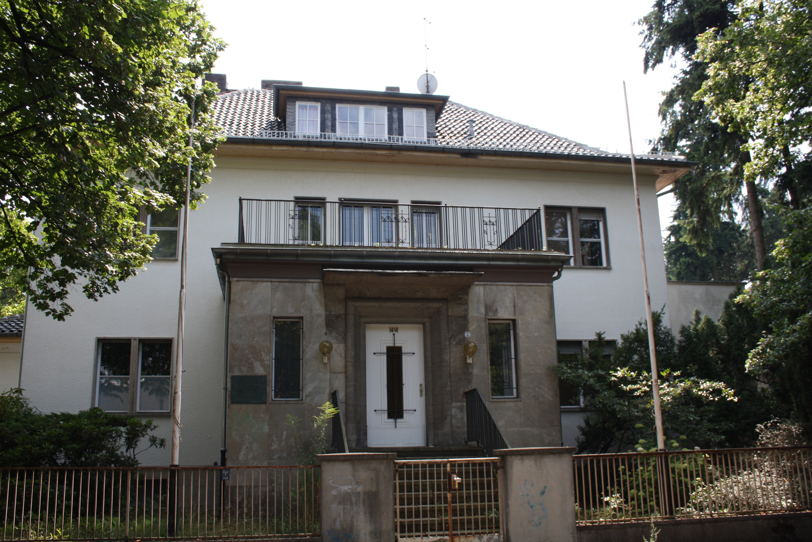 Wohnhaus Otto Grothewohl